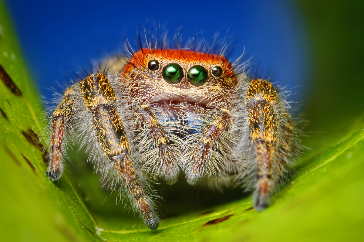 Adult female Cardinal Jumper (Phidippus cardinalis), ca. 15 mm large.